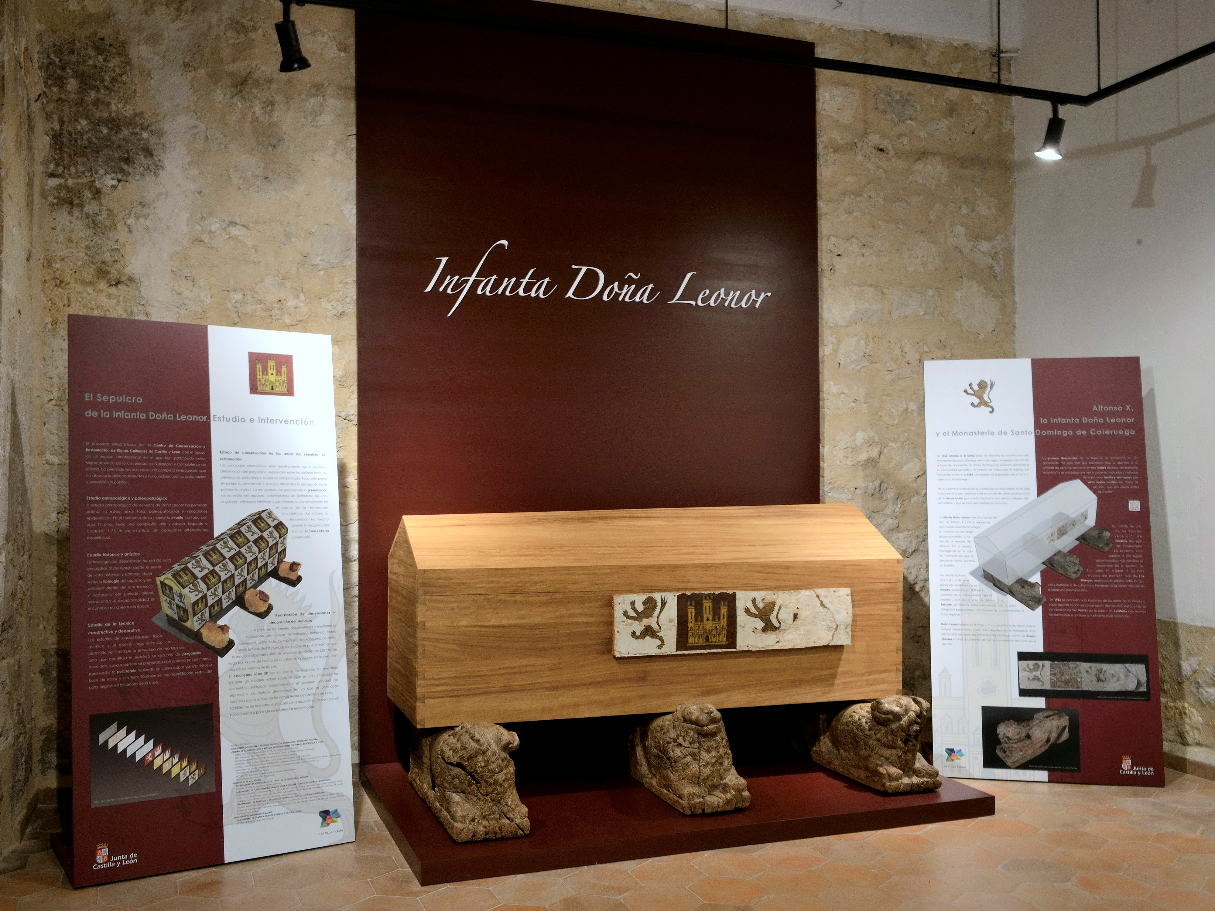 Sepulcro de la infanta Leonor de Castilla († 1275), que fue hija del rey Alfonso X el Sabio y de la reina Violante de Aragón. Se encuentra en el monasterio de Caleruega, provincia de Burgos, (España).